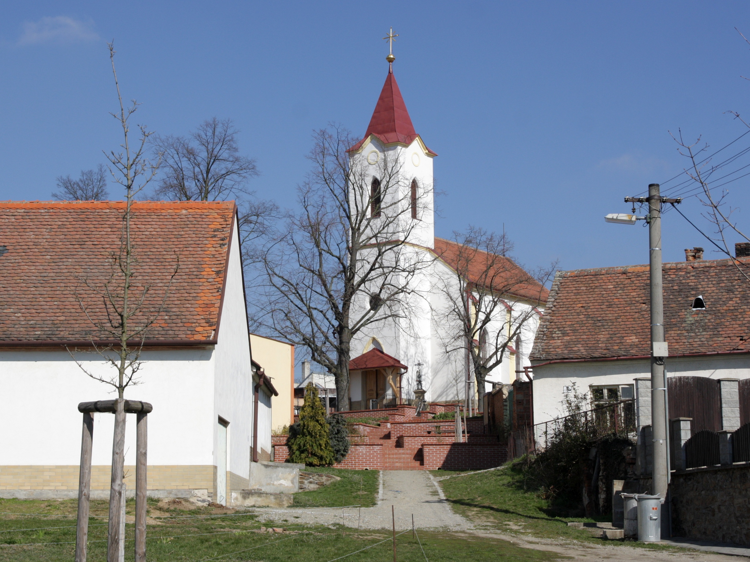 Rybníky (okres Znojmo) - kostel svatého Cyrila a Metoděje.